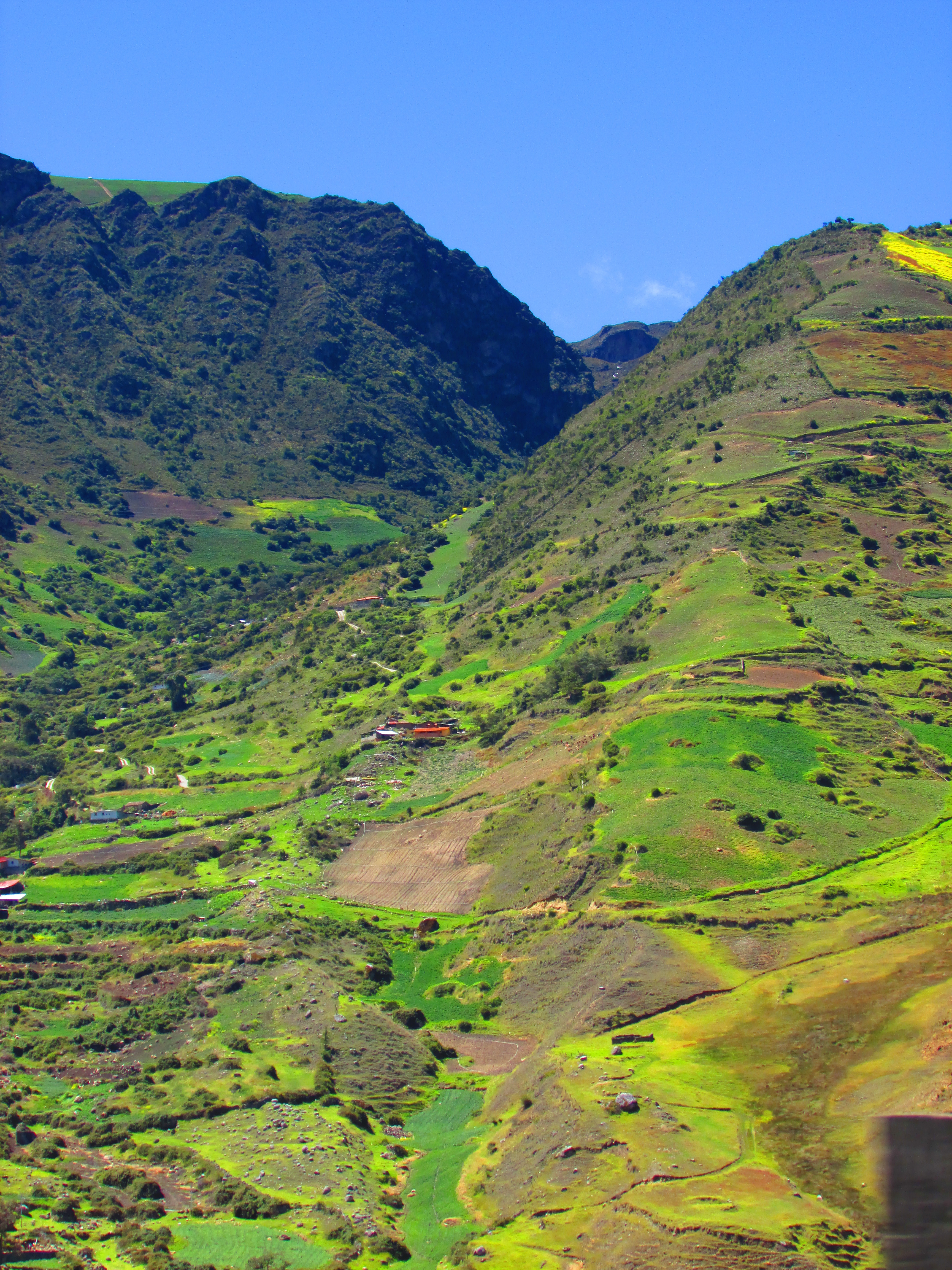 Vista de un sector de las montañas andinas cerca de la población de Mucuchíes en la vía panamericana que atraviesa el Páramo Merideño.